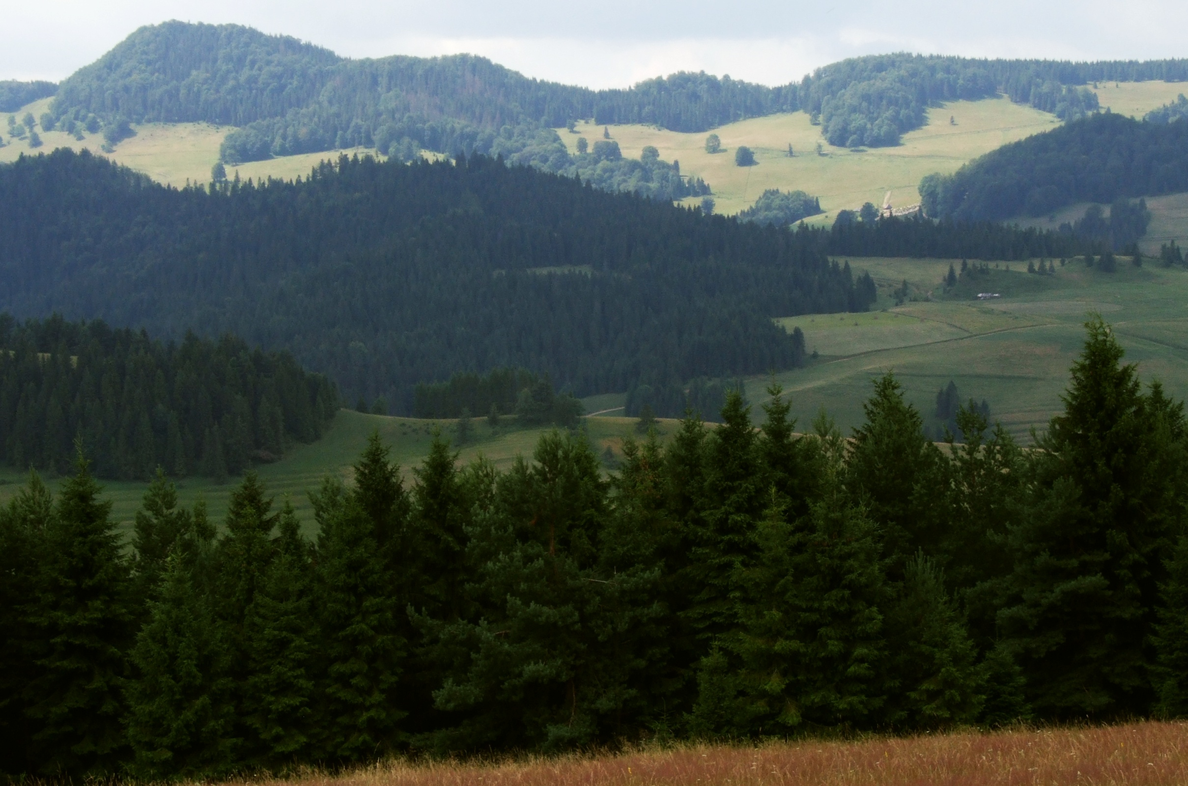 Małe Pieniny